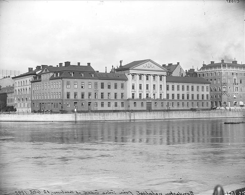 Strömgatan med Norrström i förgrunden kvarteret Rosenbad Den ståtliga byggnaden är Bondeska palatset, rivet året därpå, 1899.